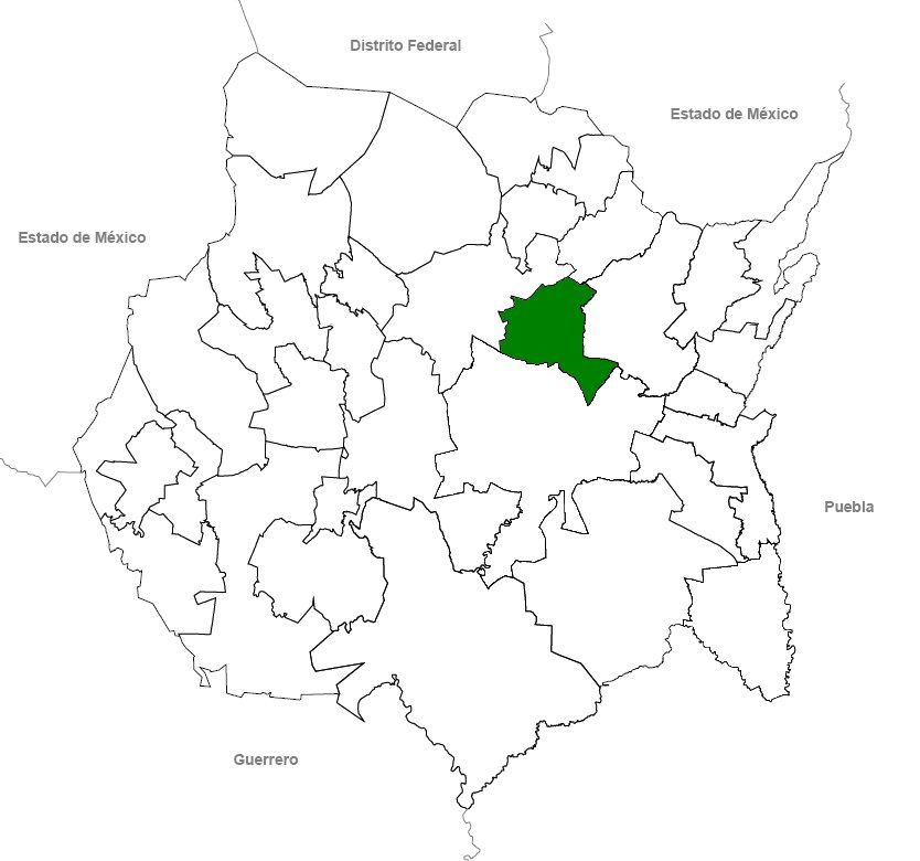 Localización de Cuautla en el estado de Morelos.